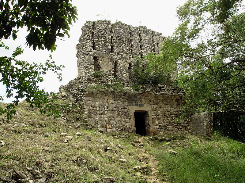 Ubicado en la zona arqueológica de Sayil Yucatán, este edificio de estilo arquitectónico Puuc conserva aún gran parte de su estructura. Se le conoce como MIRADOR por la forma que posee, sin embargo no hay certeza sobre el verdadero uso u objetivo para el cual fué construido.